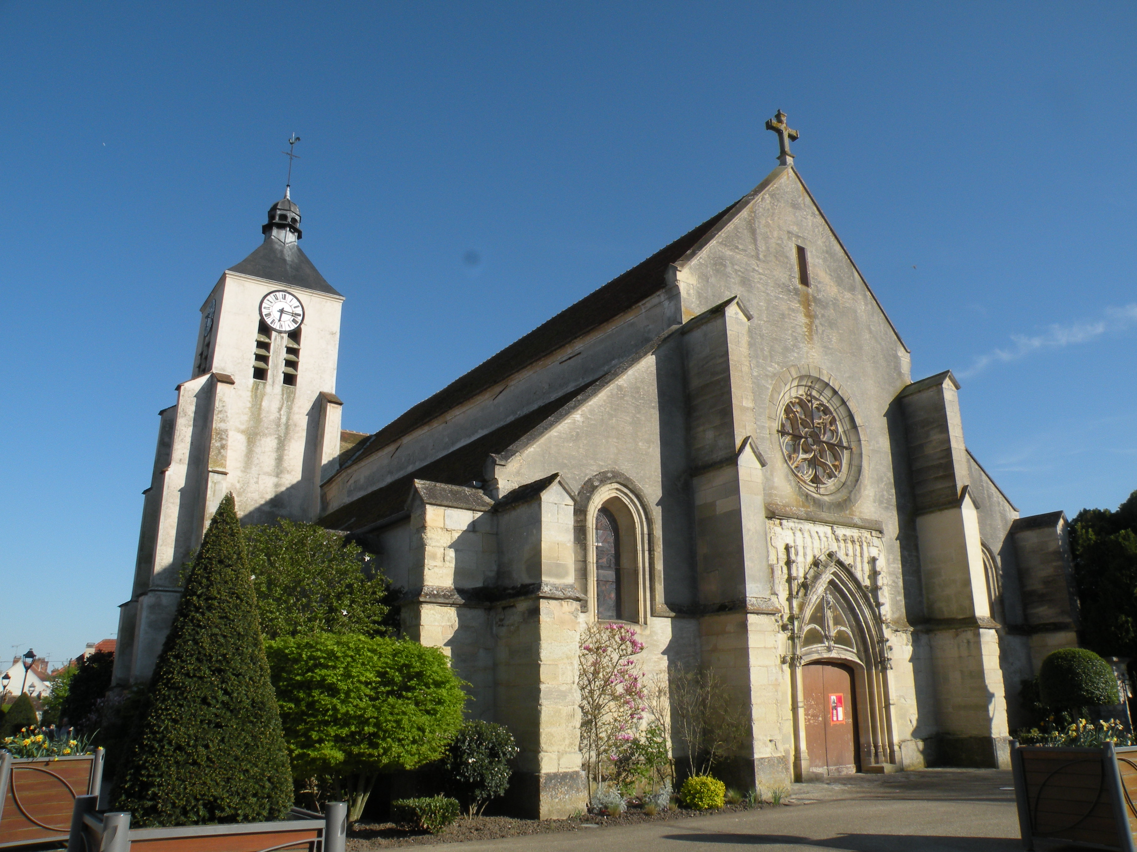 Quincy-Voisins